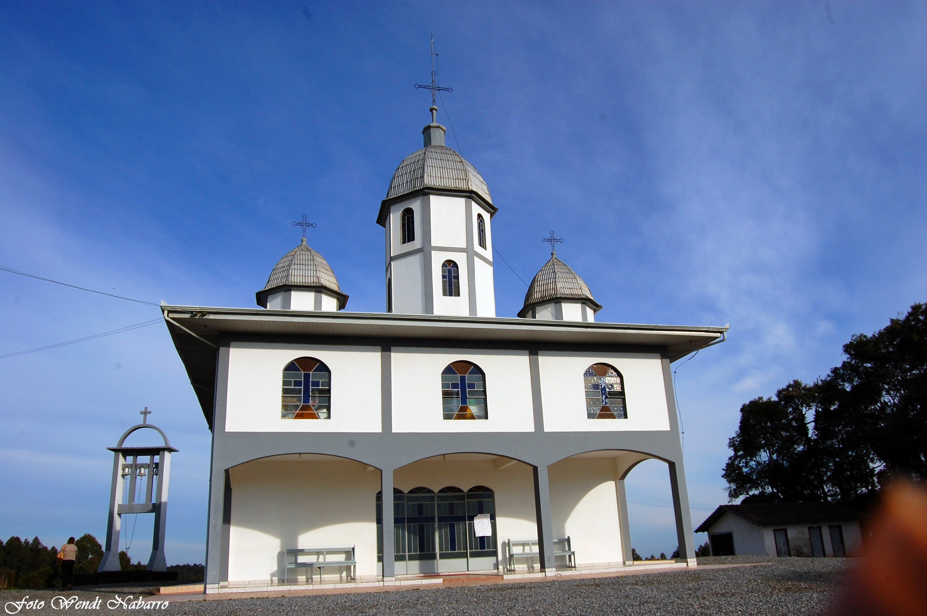 Igreja nova de São Pedro e São Paulo em Moema, Itaiópolis, Santa Catarina.